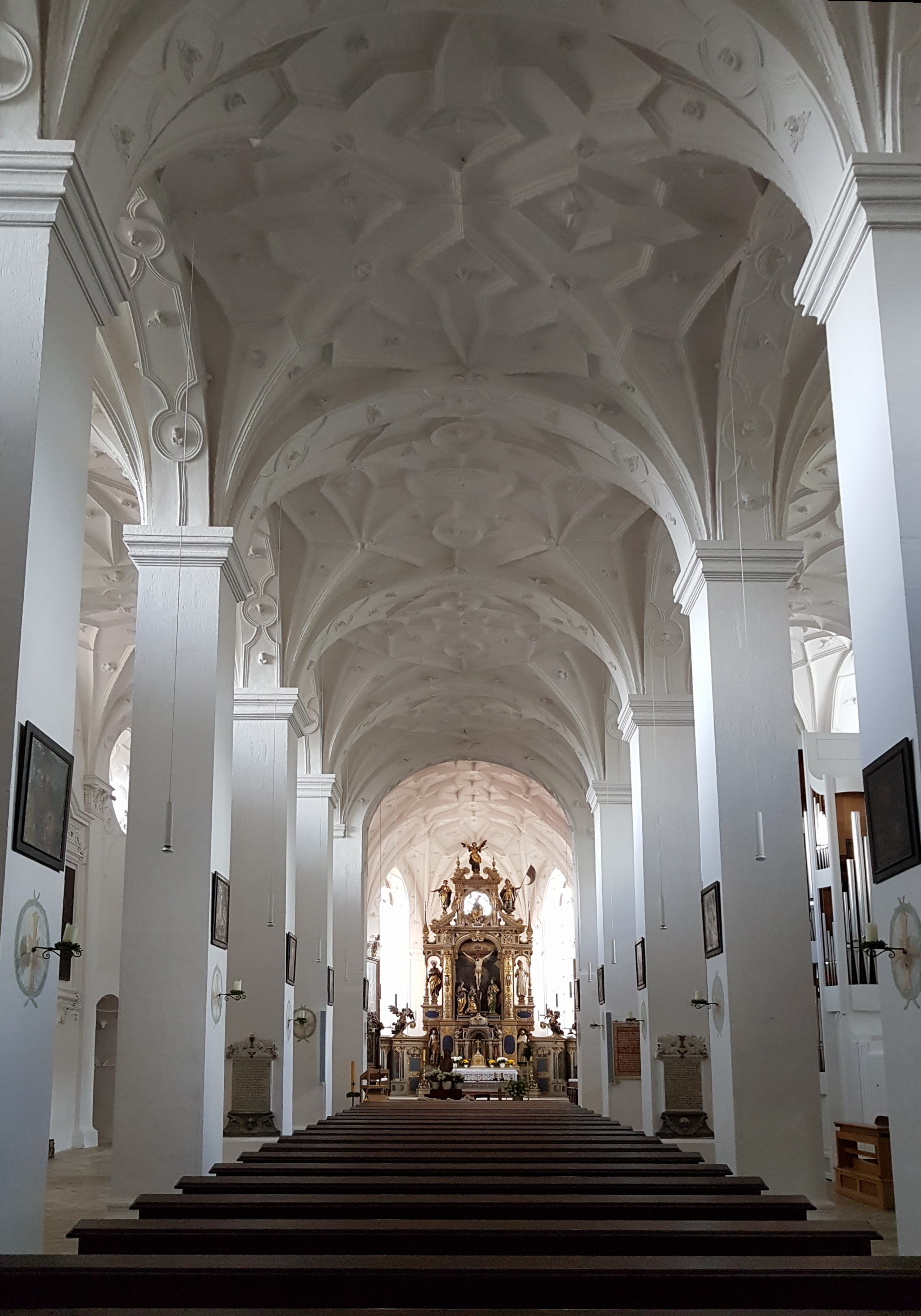 St. Vitus (Regensburg), Innenraum mit Blick zum Chor